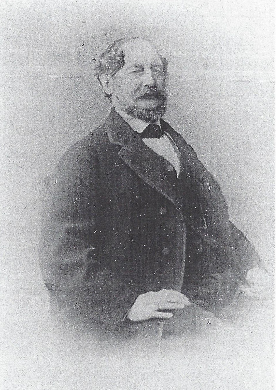 Porträtfotografie von Oskar von Meibom (1813-1874)